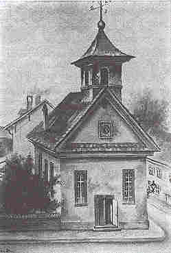 Die erste evangelische Kirche von Heddernheim (heute: Stadtteil von Frankfurt am Main) war ein Holzbau. Sie wurde im Januar 1821 geweiht und im Oktober 1893 wegen Baufälligkeit geschlossen. Die im Bild erkennbare Kirchturmsuhr wurde um 1870 angebracht.